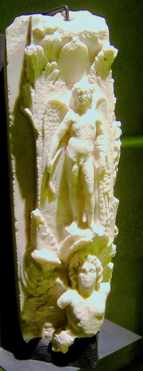 Stuk marmeren zuil uit een gymnasium: Eroten met knots en leeuwenvel 100-50 v.C. Sagalassos